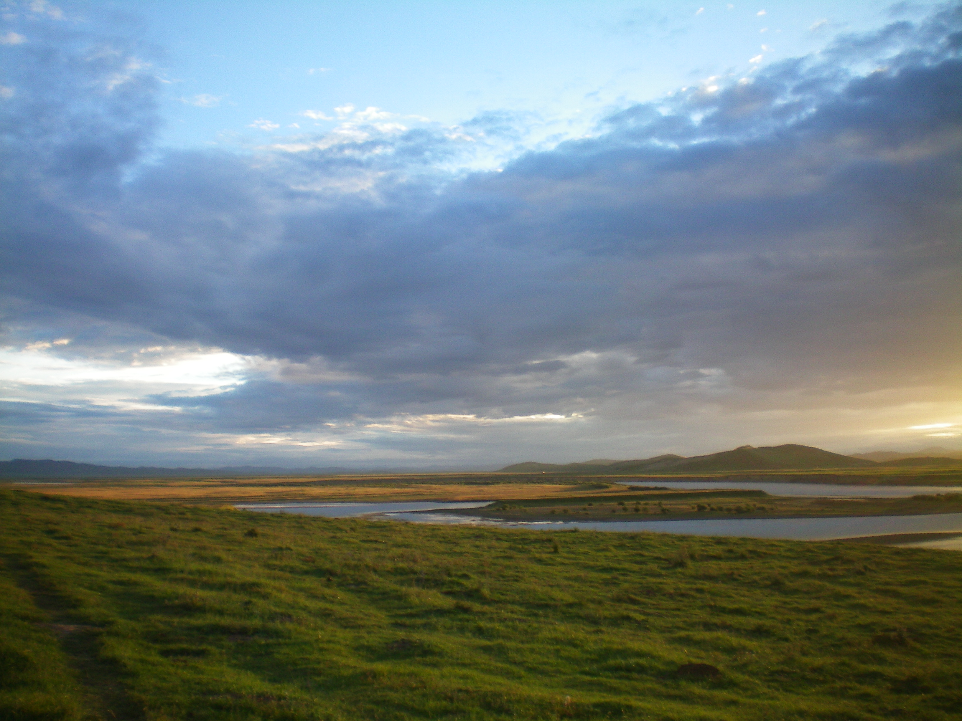 九曲黄河第一湾，四川省诺尔盖县唐克镇索克藏寺